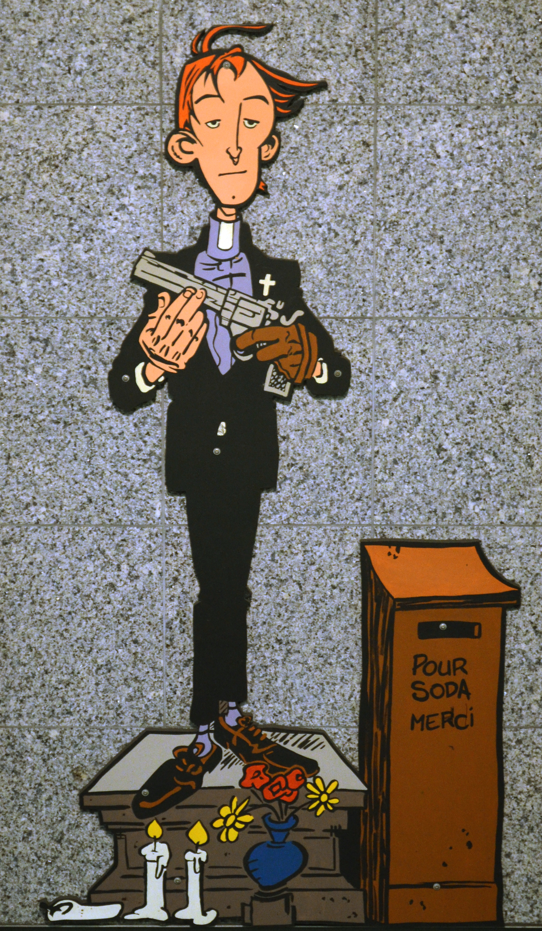 Charleroi (Belgique) - Station Janson du métro léger. Soda de Luc Warnant, ensuite Bruno Gazzotti et Dan (dessin) et Philippe Tome (scénario).